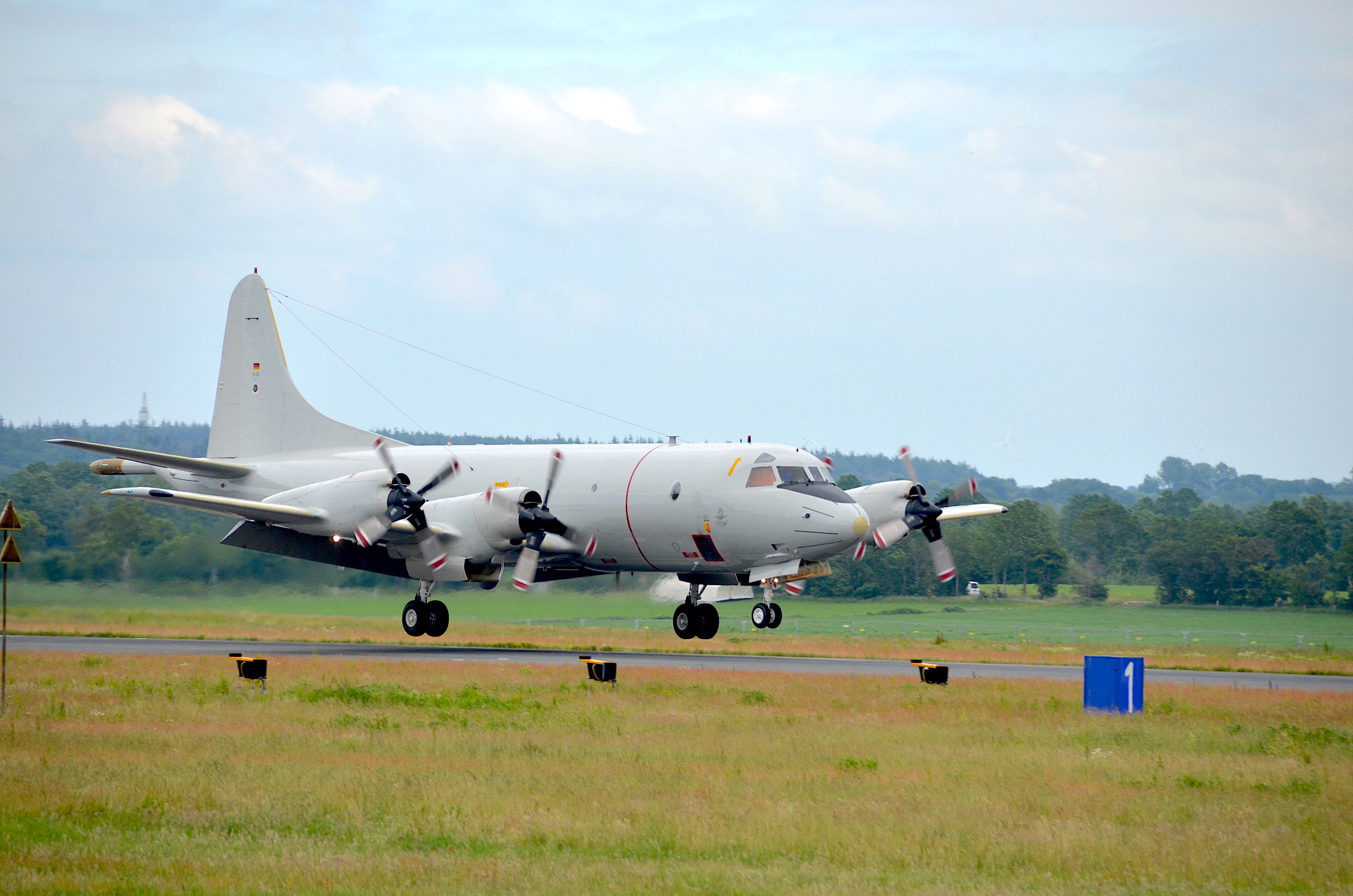 Landung Lockheed P-3C Orion (60+01)